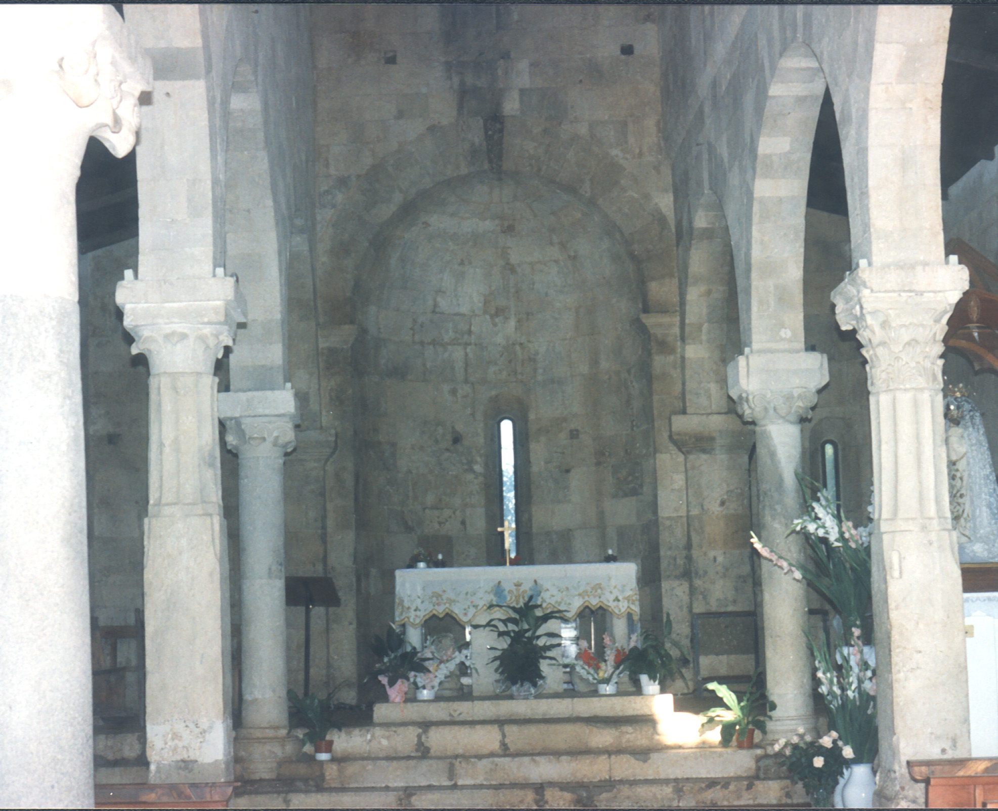 Chiesa di Santa Maria (XII secolo), Uta (CA), Sardegna